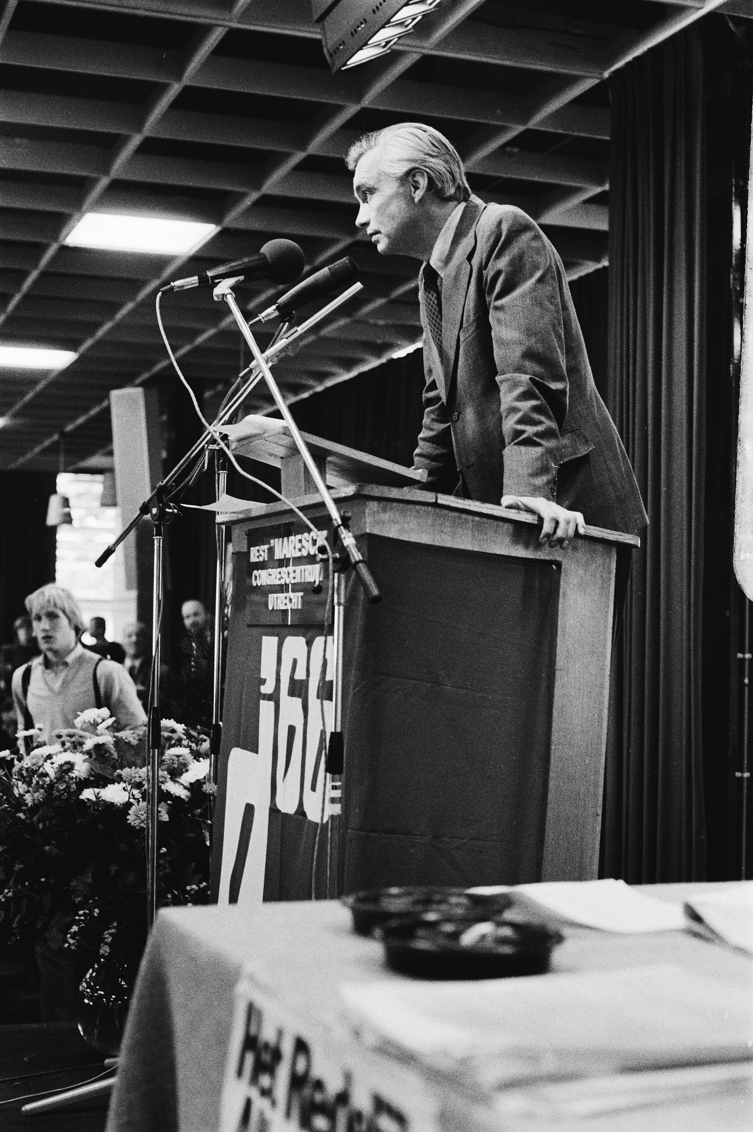 Collectie / Archief : Fotocollectie Anefo Reportage / Serie : Ledenvergadering van D66 in Utrecht Beschrijving : Glastra van Loon tijdens rede Datum : 27 oktober 1979 Locatie : Utrecht (prov.), Utrecht (stad) Trefwoorden : congressen, politiek, politieke partijen, toespraken Persoonsnaam : Glastra van Loon, Jan Instellingsnaam : D66 Fotograaf : Dijk, Hans van / Anefo Auteursrechthebbende : Nationaal Archief Materiaalsoort : Negatief (zwart/wit) Nummer archiefinventaris : bekijk toegang 2.24.01.05 Bestanddeelnummer : 930-5134